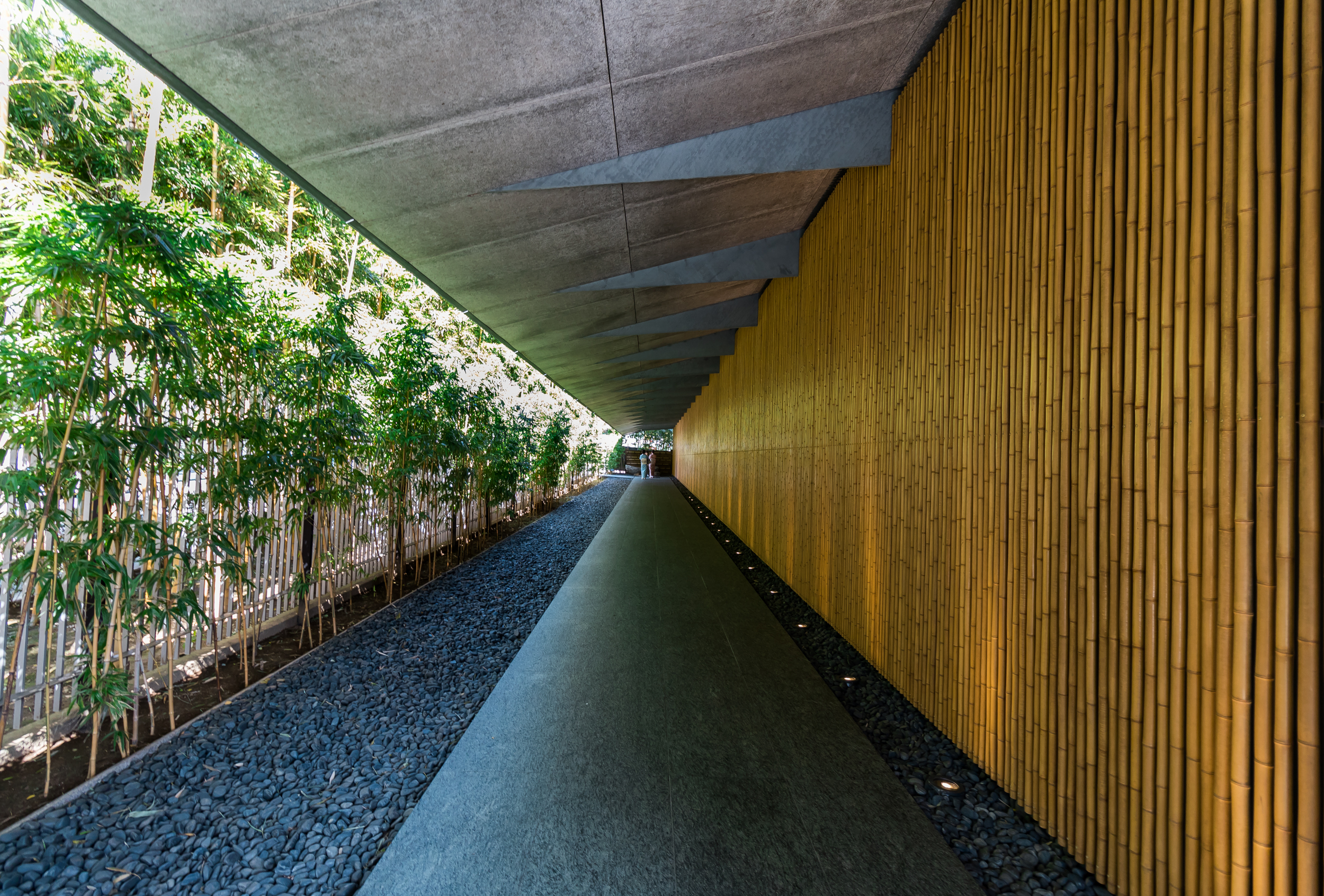 根津美術館。隈研吾設計。